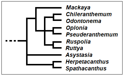 Pseuderanthemum_lineage_-_Cladogramma_del_gruppo